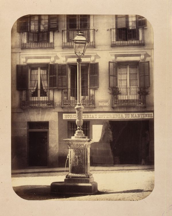 Fuente en la Calle del Caballero de Gracia, Madrid. Obra en 1864 del fotógrafo toledano Alfonso Begué, muerto el 31 de octubre de 1865. Cartulina sepia. Albúmina. 43 x 32 cm. Fotografía contenida en un álbum procedente del Archivo de Villa y trasladado al Museo de Historia en 1983.